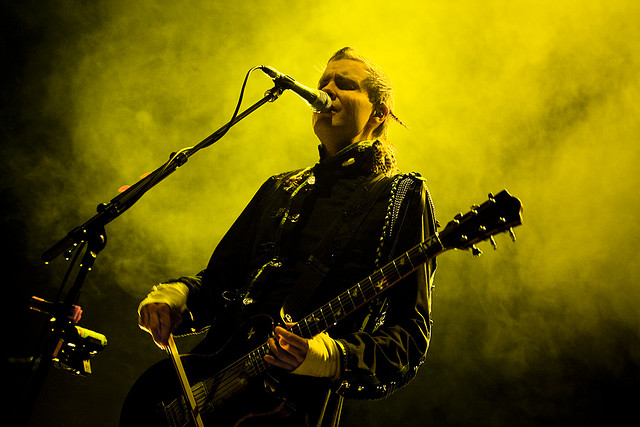 No Campo Pequeno, November 11, 2008